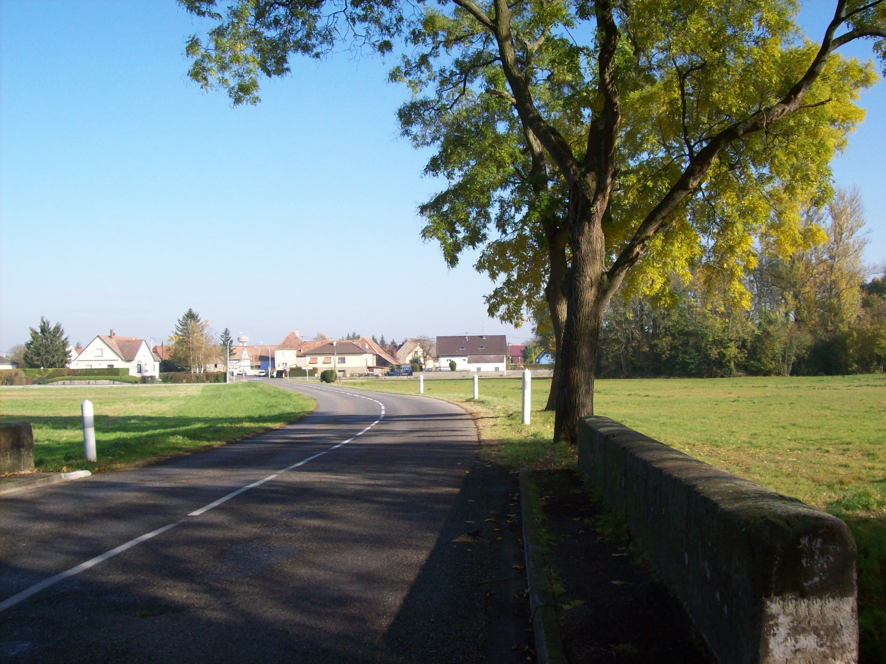 Route de Forchwihr etrée Ouest du village